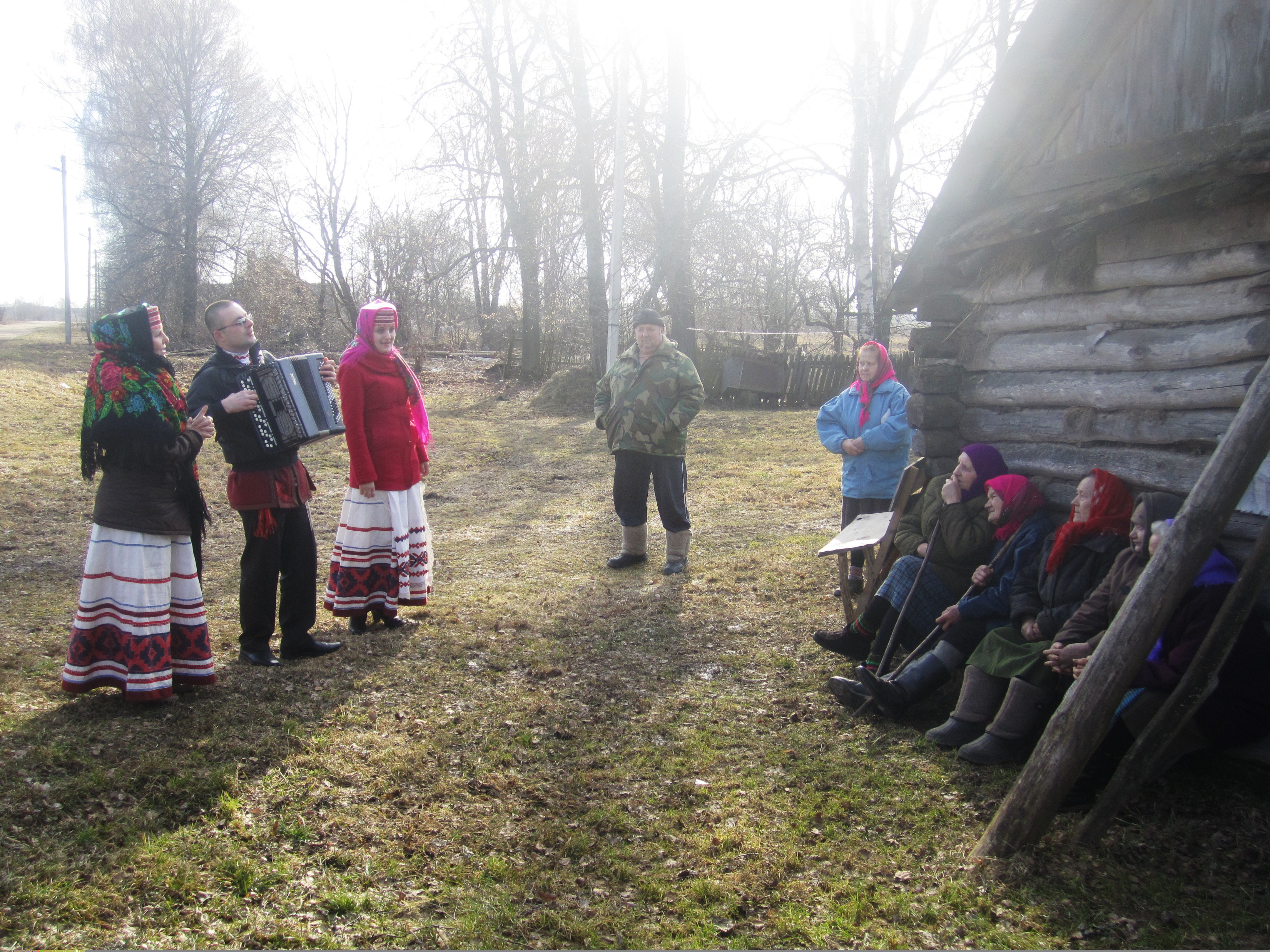 деревня